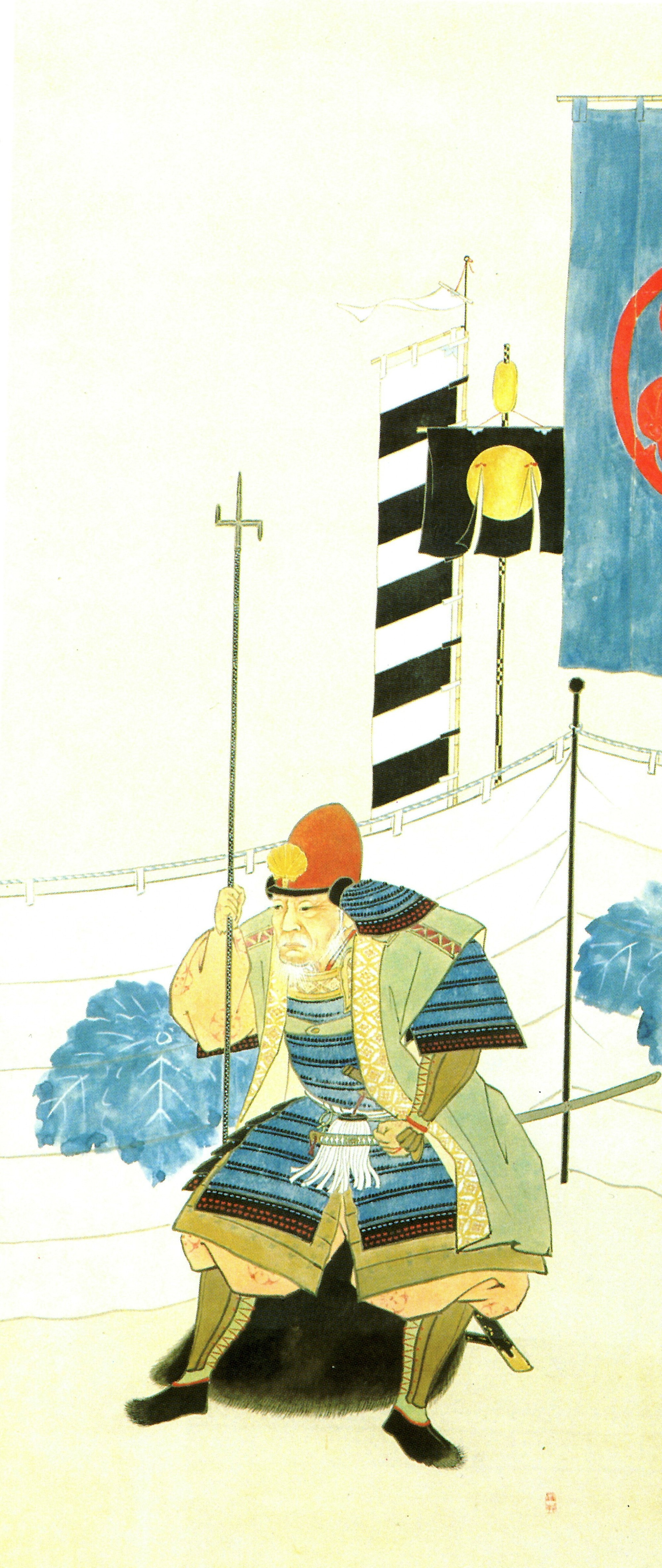 松平康親の肖像。